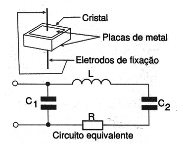 circcrits